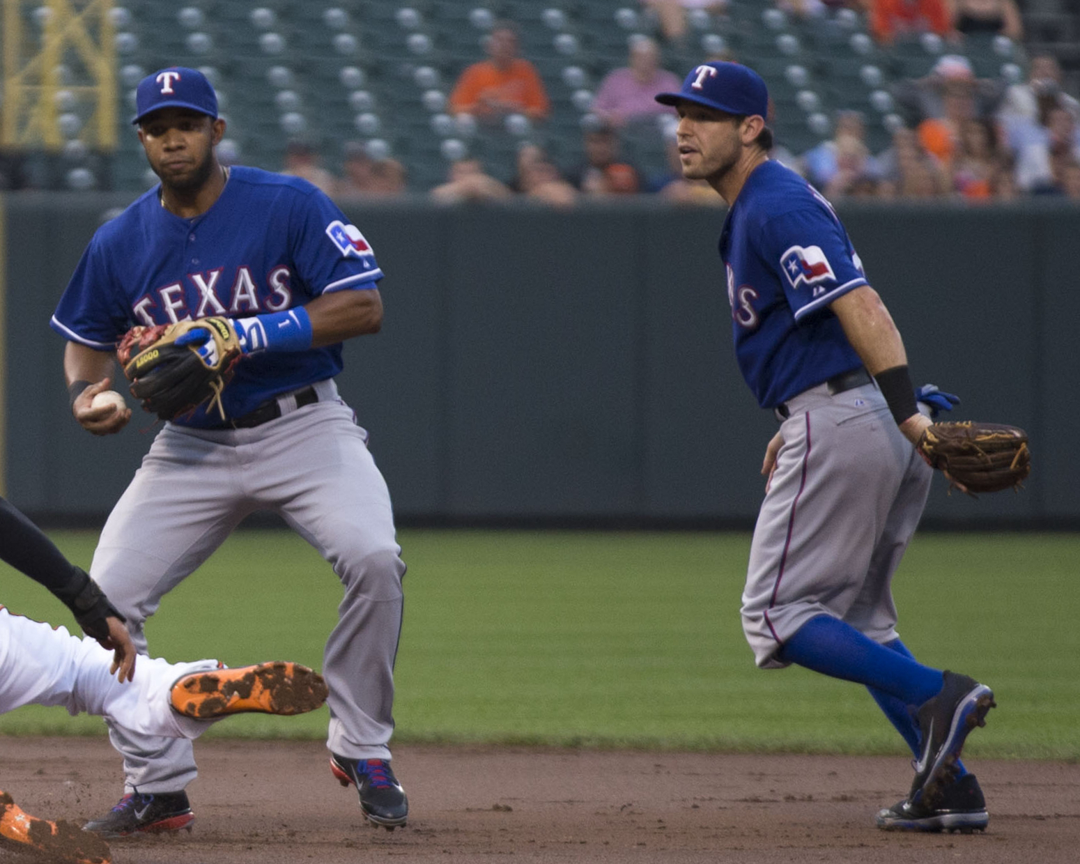 Elvis Andrus (left) and Ian Kinsler